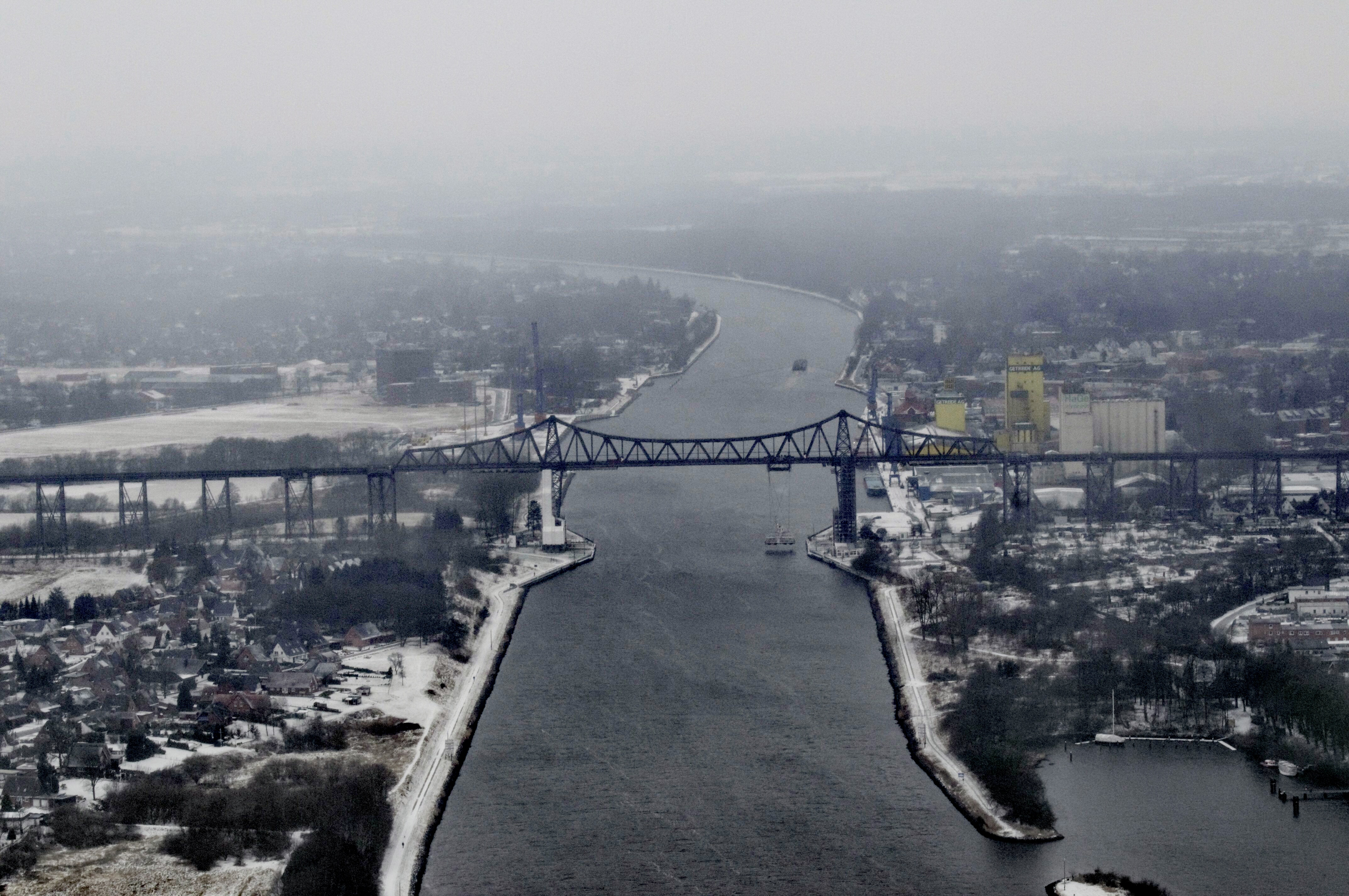 Nord-Ostsee-Kanal in Rendsburg, Blickrichtung West. Rendsburger Hochbrücke mit Schwebefähre